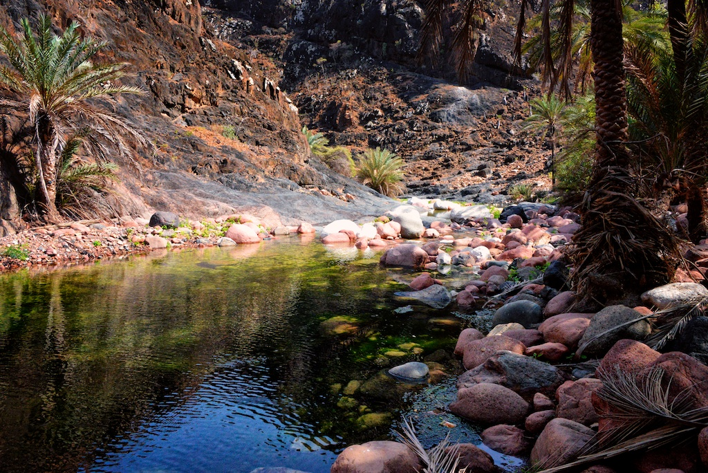 Yemen